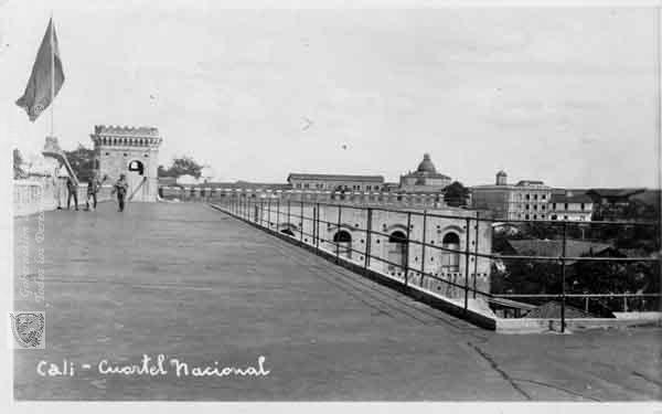 Instalaciones del Cuartel Nacional de Cali. C. 1935.